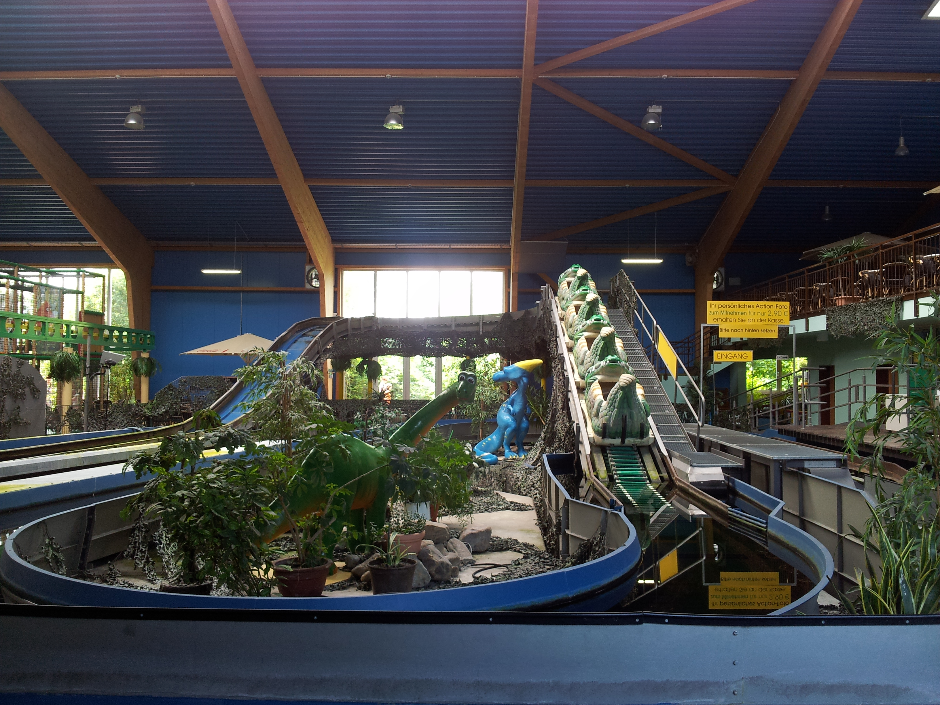 Dinoworld Wildwasserbahn